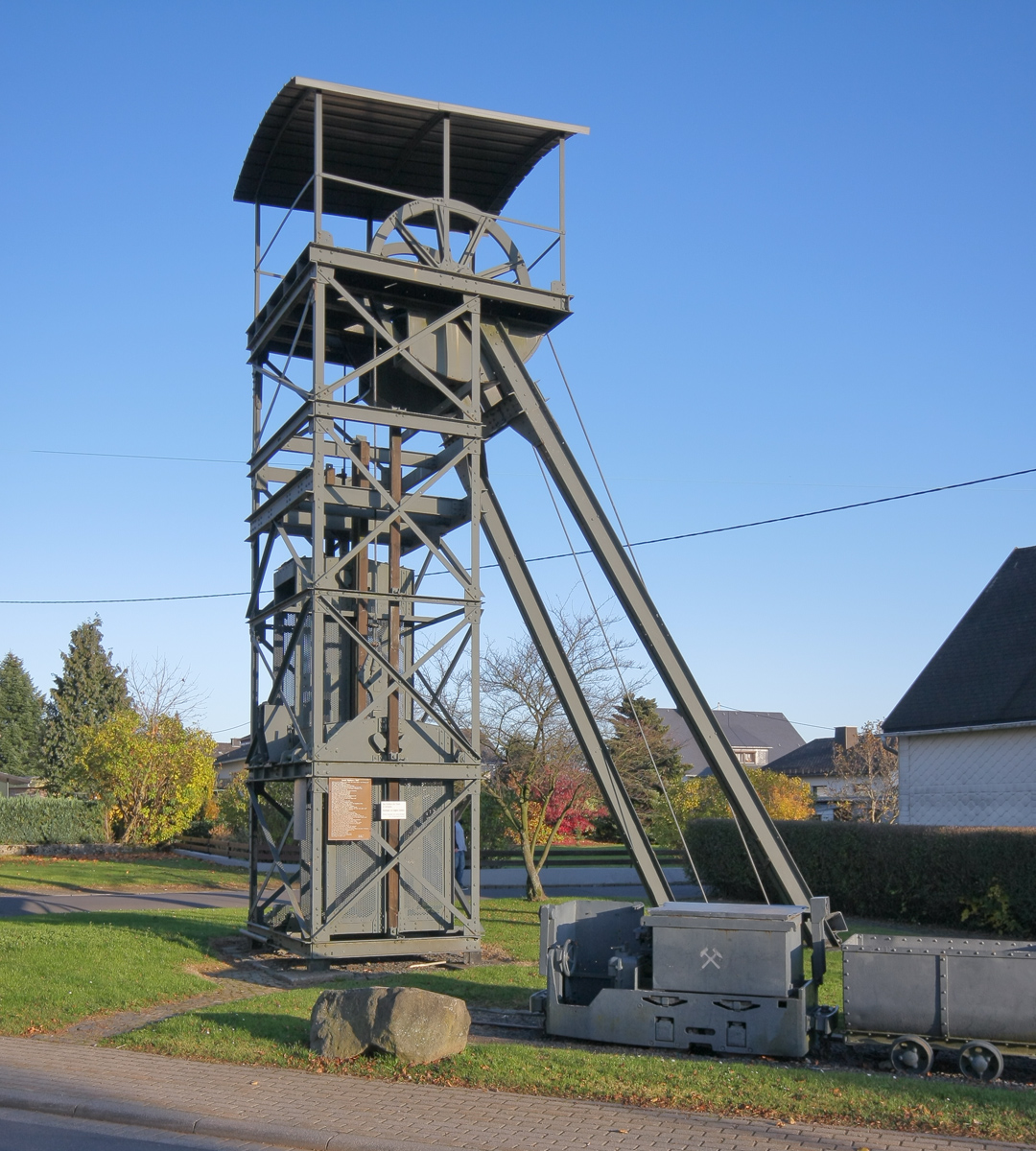 Ein Fördergerüst und eine Grubenbahn der 1961 stillgelegten und 1989 abgerissenen Braunkohlegrube Alexandria wurde als Industriedenkmal am Marktplatz von Höhn (Westerwald) erhalten.